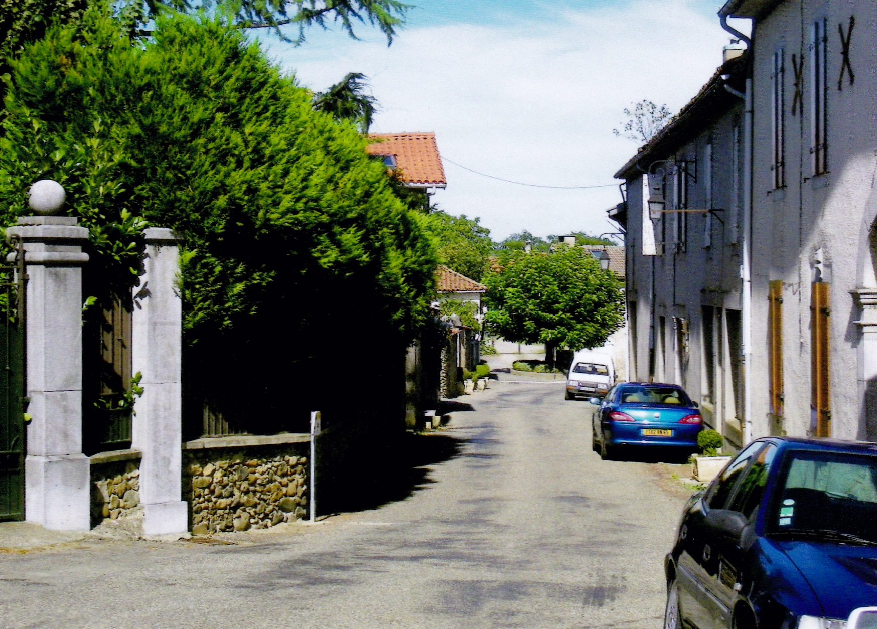 La rue de l'Ormeau actuelle